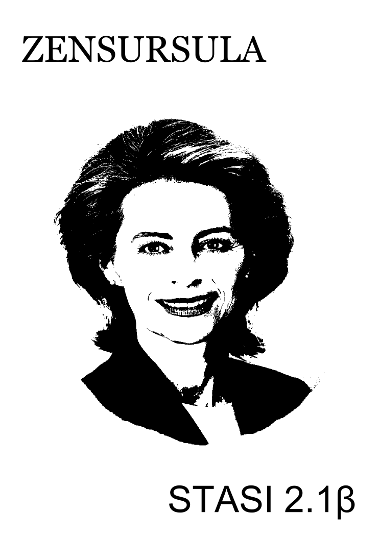 Ursula von der Leyen, Bundesministerin für Arbeit und Soziales der Verteidigung.